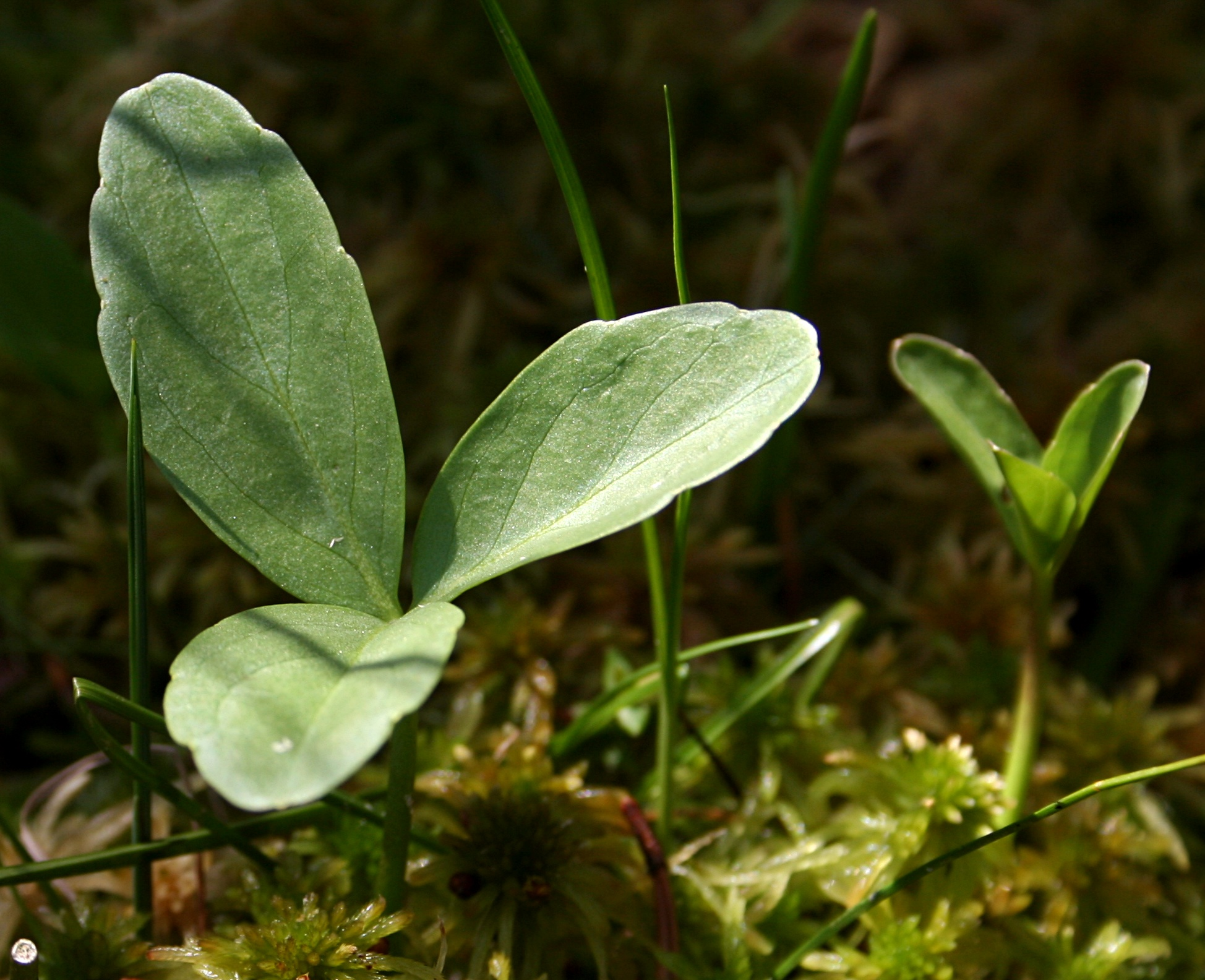 bobrek trójlistkowy w rezerwacie Dury, Wdecki Park Krajobrazowy